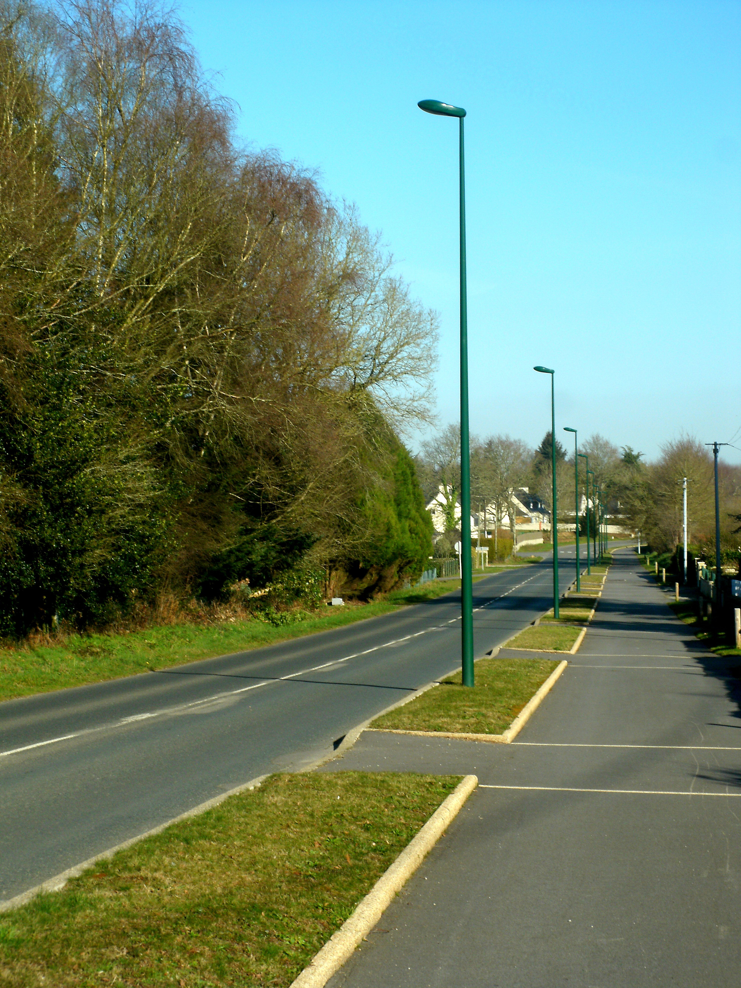 Route d'Hennebont (RD724) à gauche, piste partagée à droite.